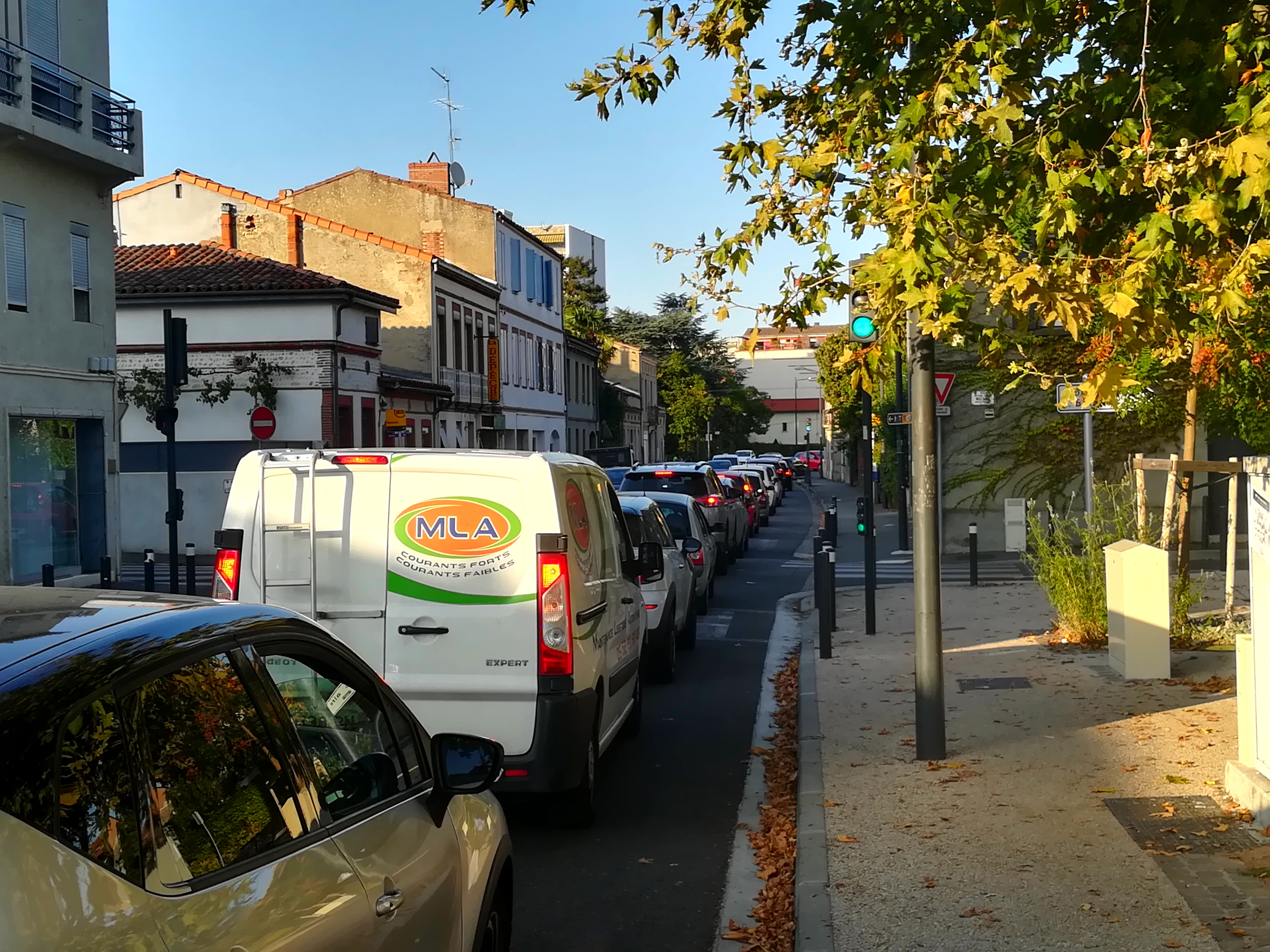 Embouteillage sur la rue Vestrepain dans le quartier de Fontaine-Lestang à Toulouse.